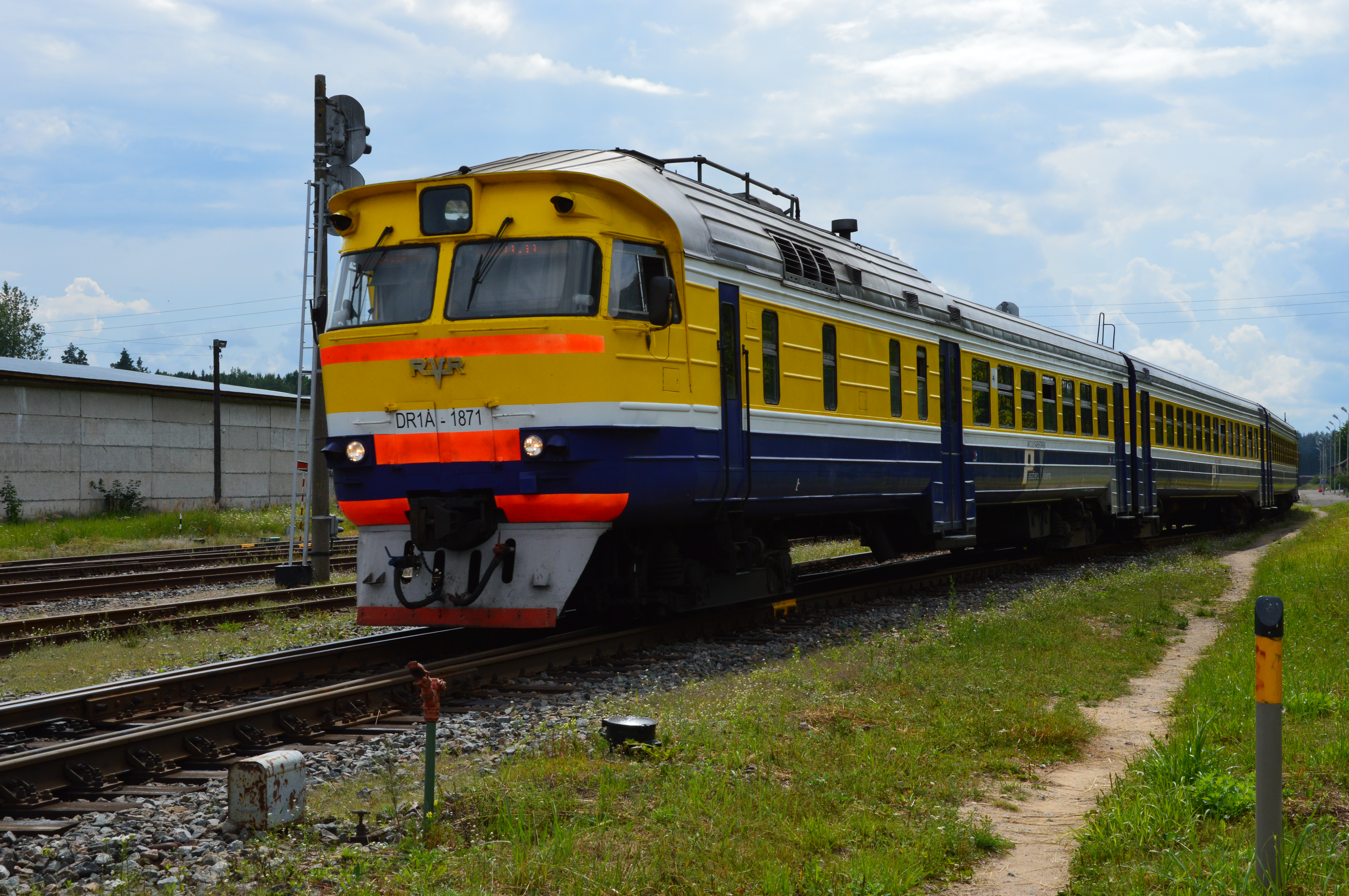 Ieriķi raudteejaam, DR1A-1871.